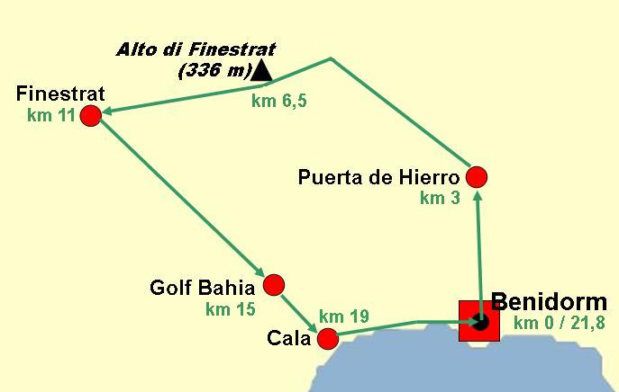 Streckenverlauf der Straßenrad-Weltmeisterschaft 1992